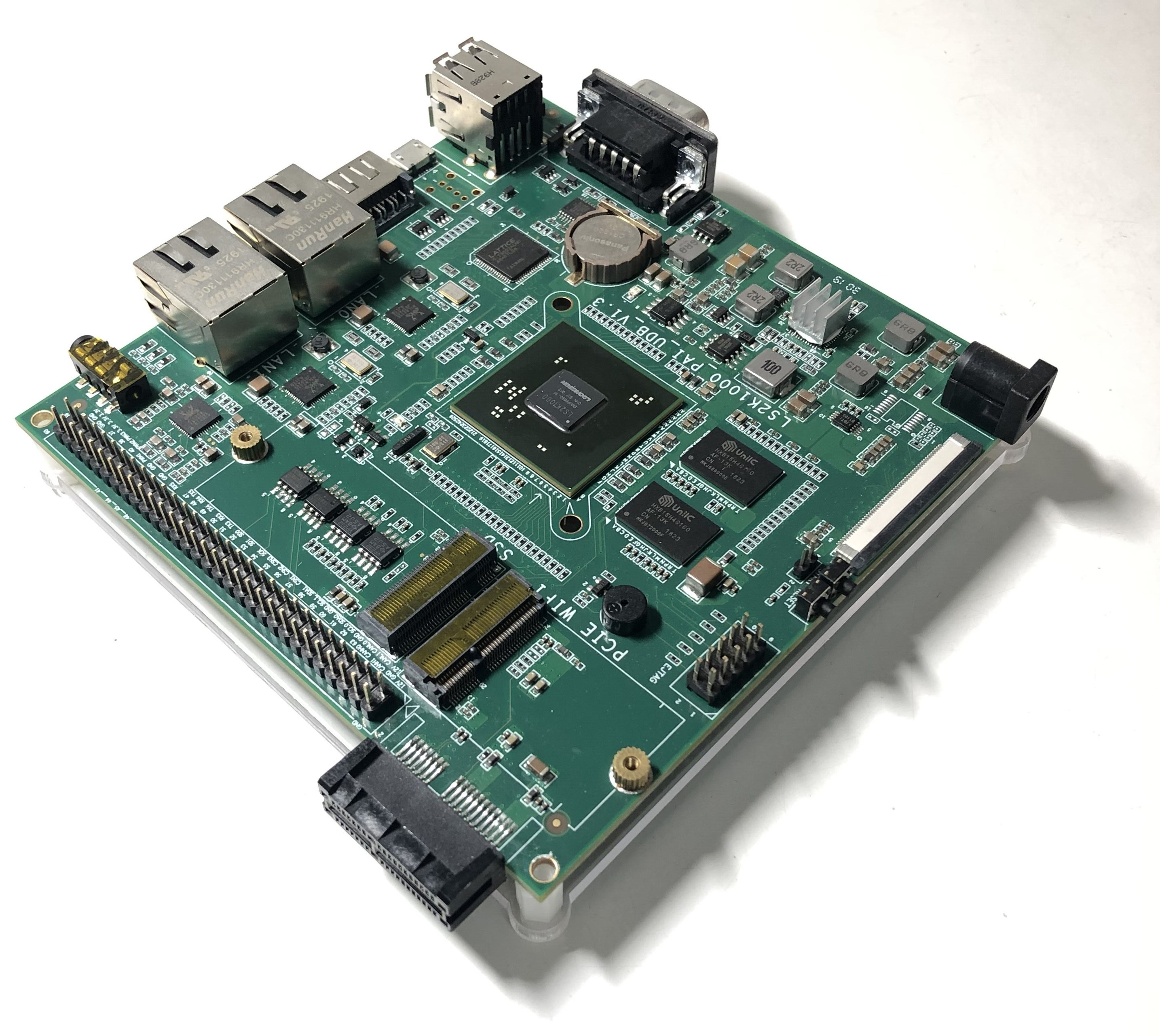 中文（中国大陆）: 龙芯派2代